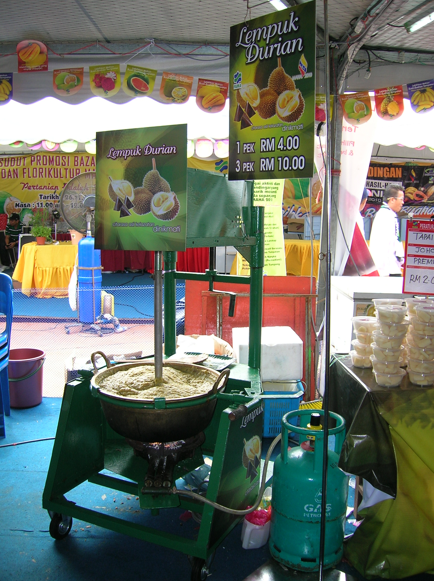 Tiada maklumat lanjut.